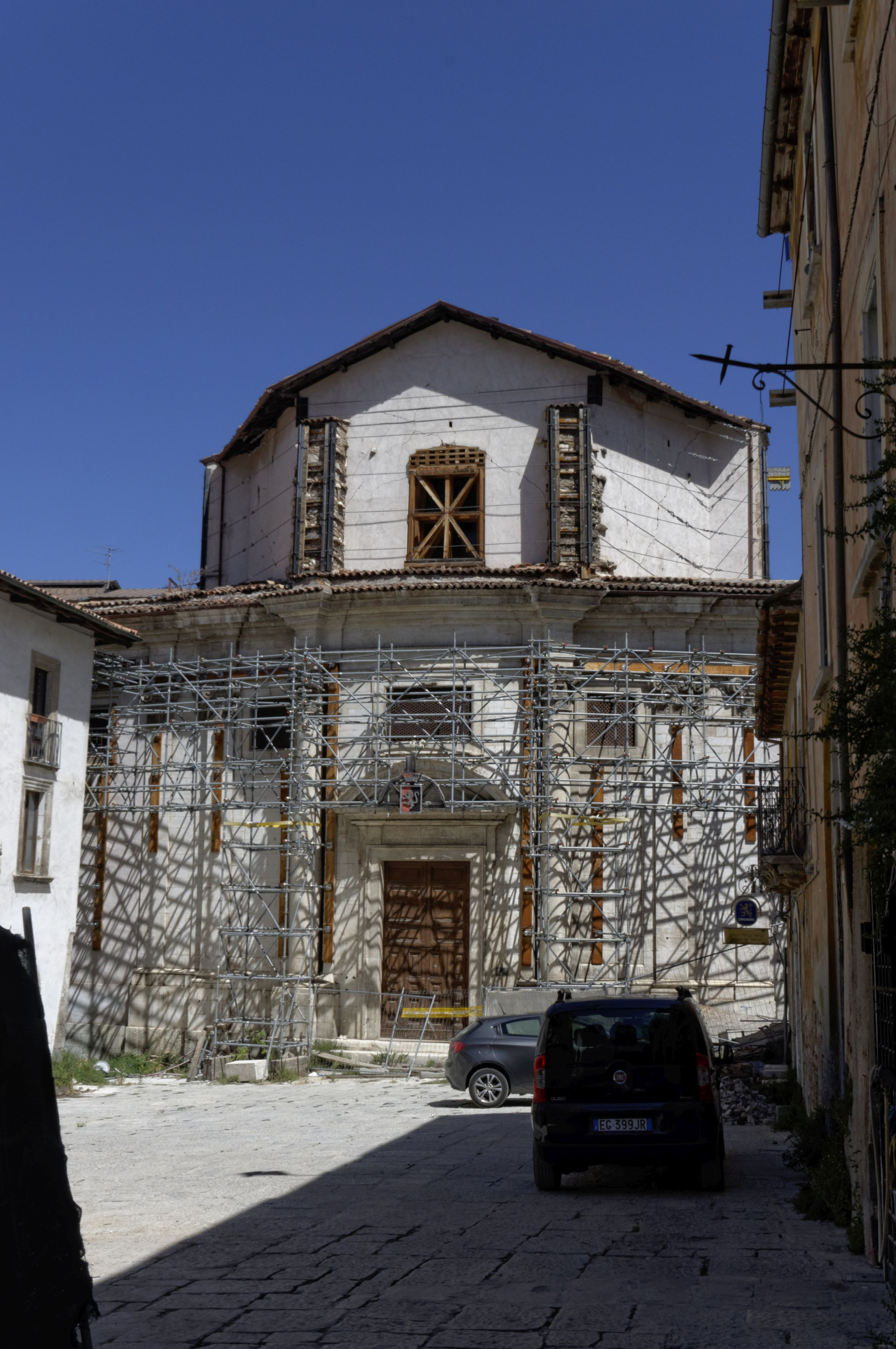 L'Aquila 2017 Dieses Foto entstand in Zusammenarbeit mit Stadtbesichtigungen.de Die Seiten Stadtbesichtigungen.de, der dazugehörige Reise Blog sowie die Facebookseite: Stadtbesichtigungen Rom dürfen dieses Bild für Ihre Veröffentlichungen ohne den Hinweis auf Wikipedia, Commons bzw der Lizenz verwenden. Die Verantwortlichen habe von mir (Ra Boe) die Originaldaten zur freien Verfügung übermittelt bekommen.